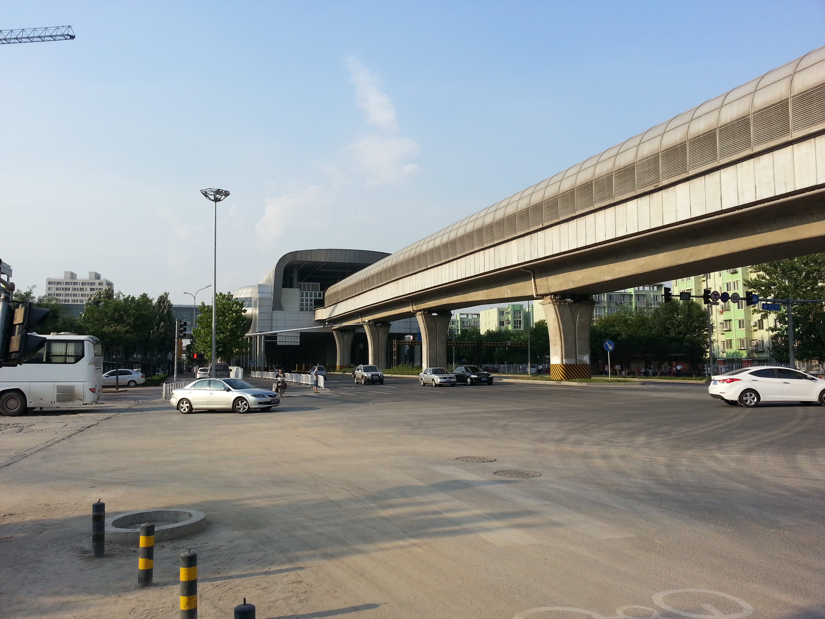 西红门站外观